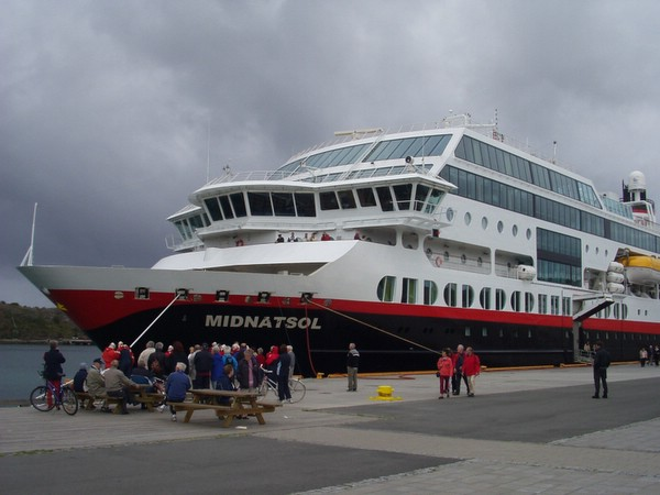 MS Midnatsol im Hafen von Bodø